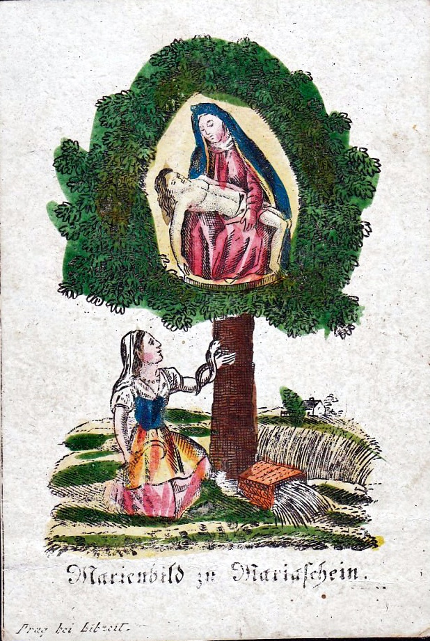 Mariaschein (heute Bohosudov in Tschechien), Wallfahrtsandenken um 1850